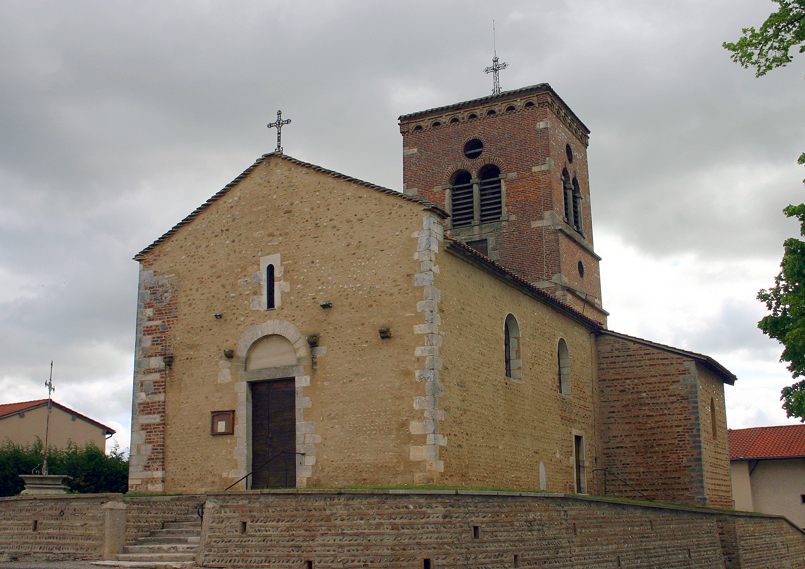 Église Saint-Pierre, (Inscrit, 1979) .